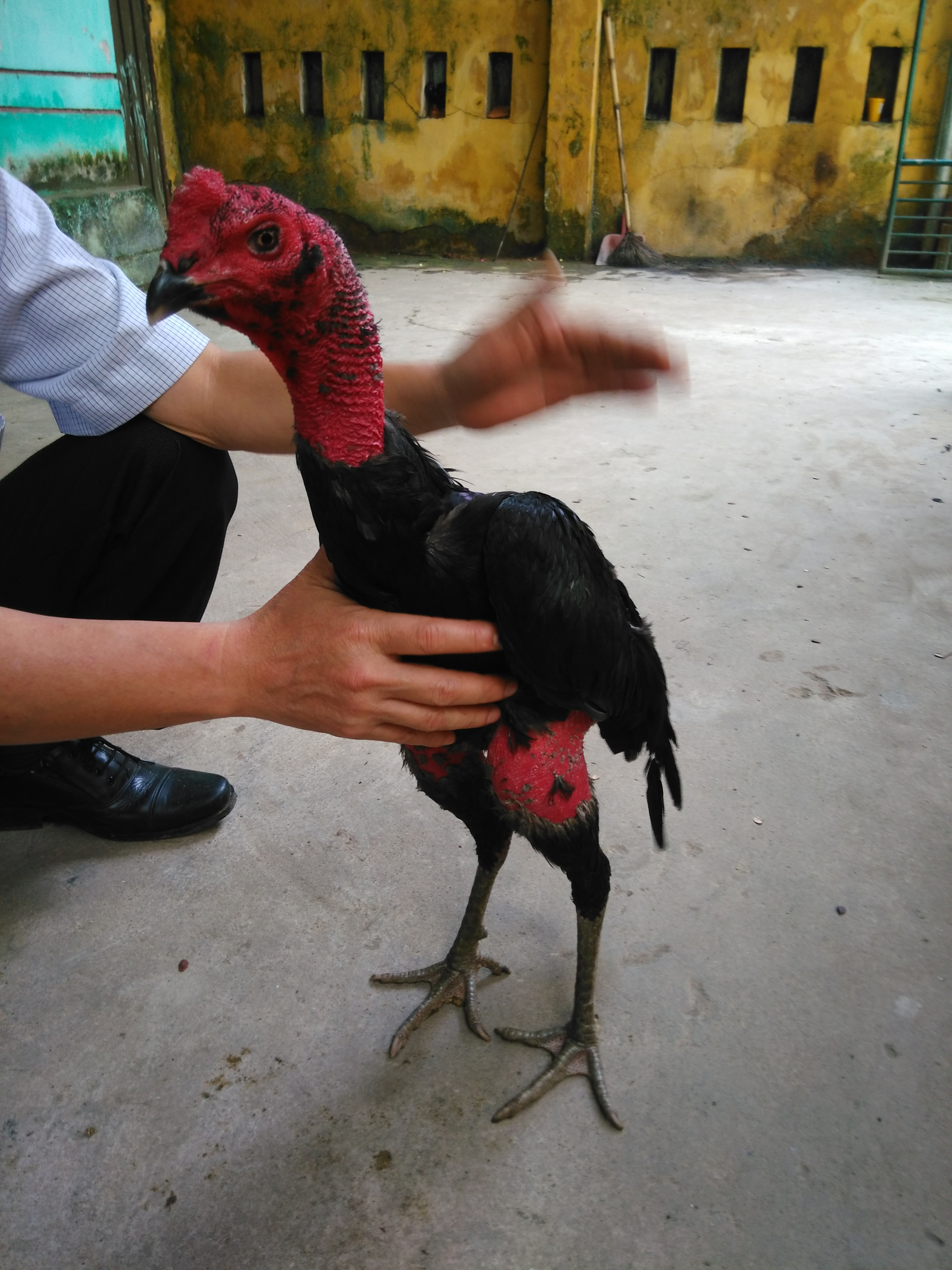 Gà chọn